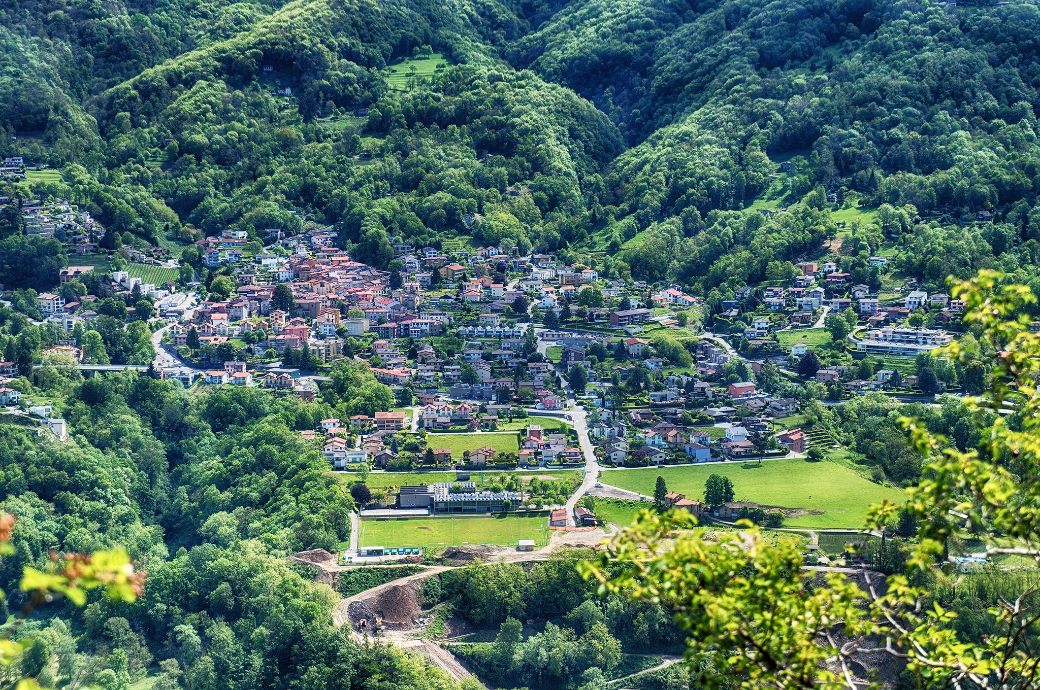 Panoramica di Cadro